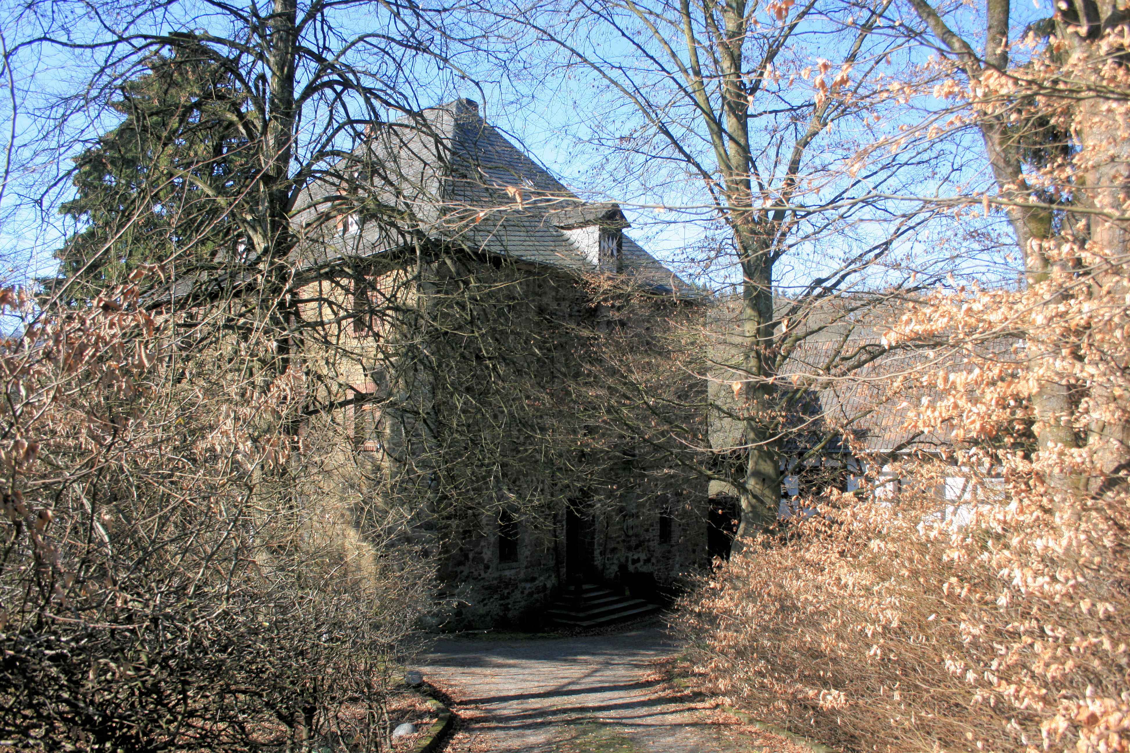 Burg Hof in Windeck-Rosbach